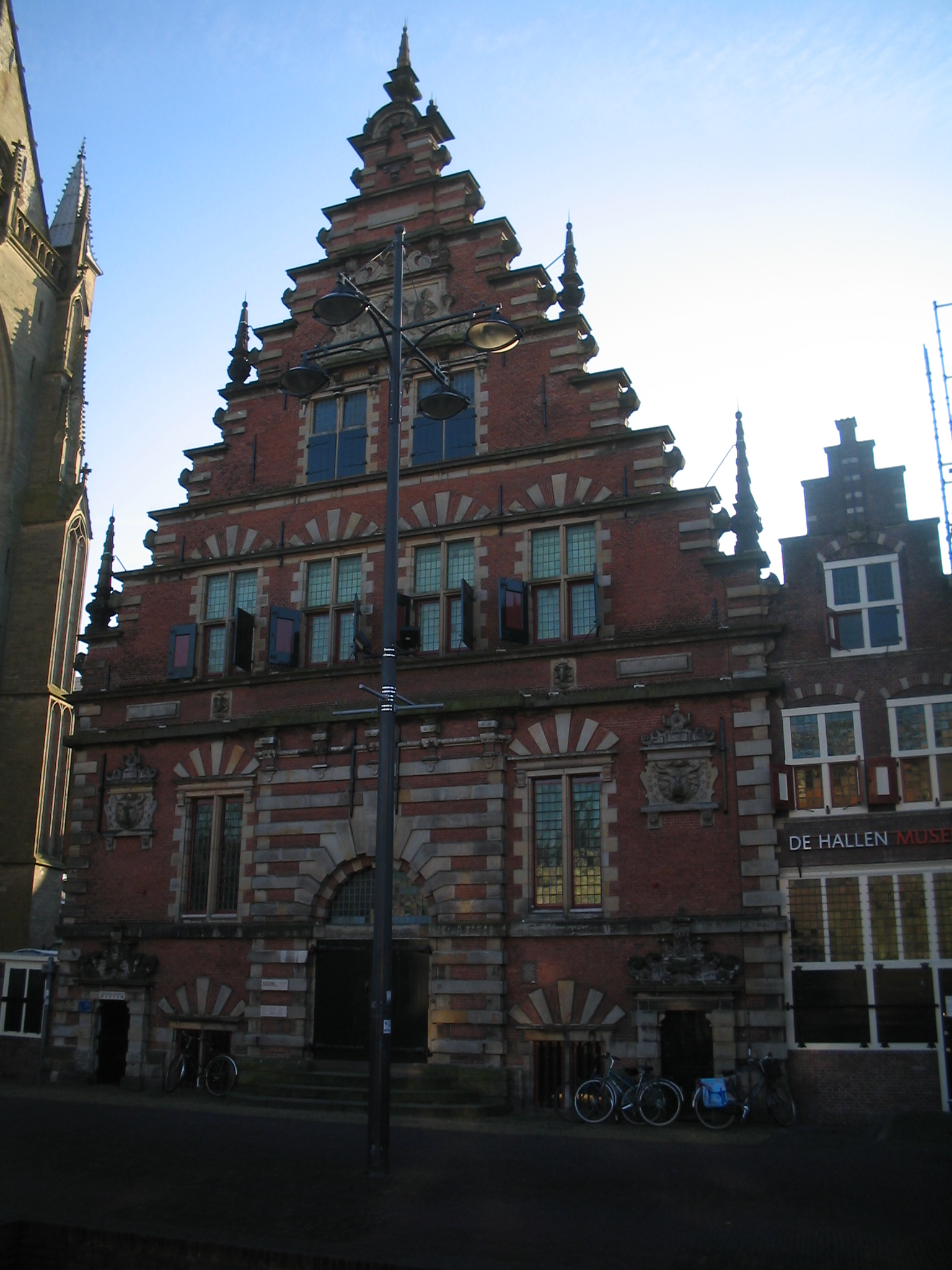 De hallen (museum), haarlem